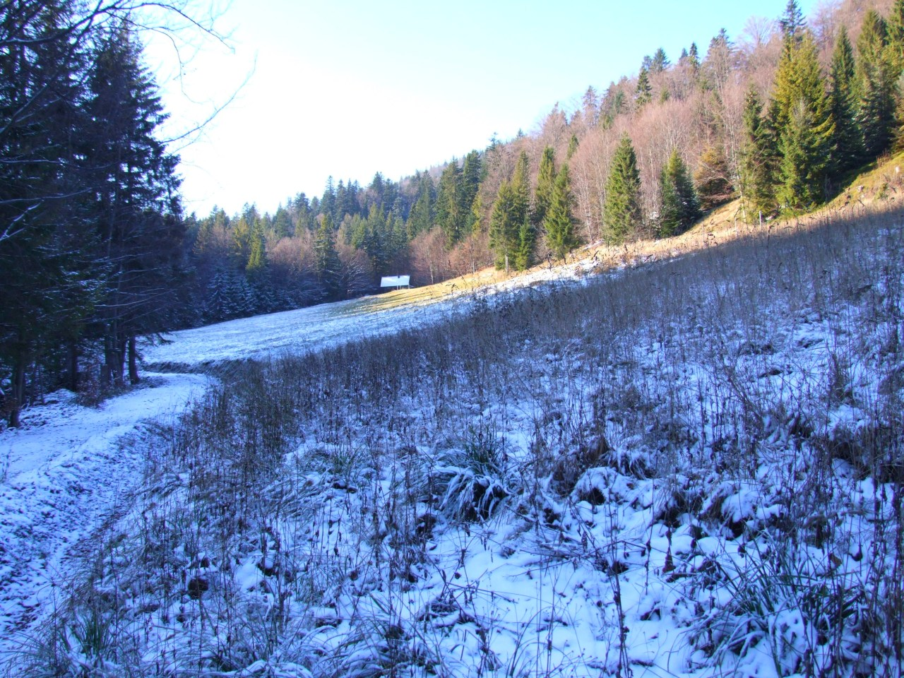 Polana Łonna w Gorcach (Ochotnica Górna)